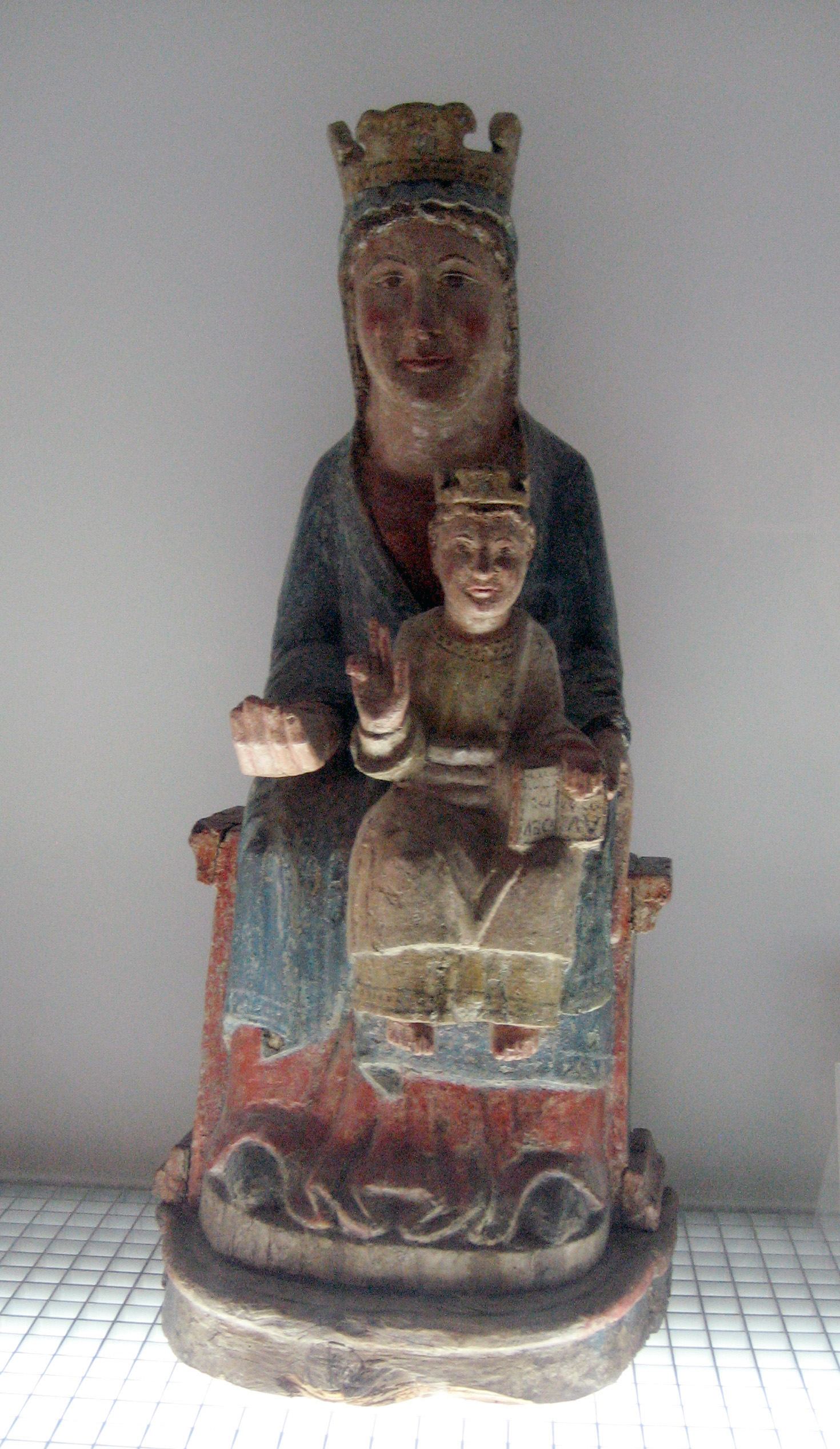 Verge de Baiasca (terme municipal de Llavorsí. Talla en fusta policromada del segle XIII, exposada al Museu Diocesà d'Urgell.